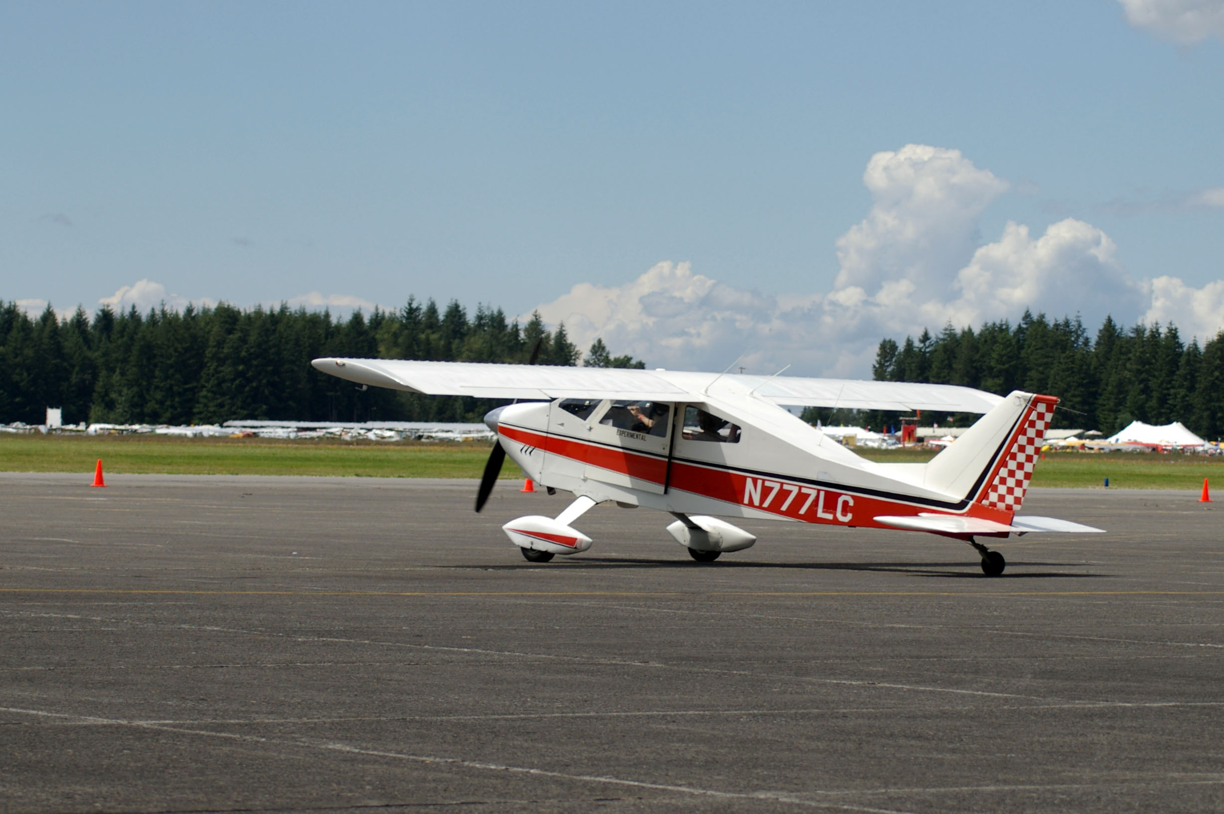 BD-4 Experimental Aircraft